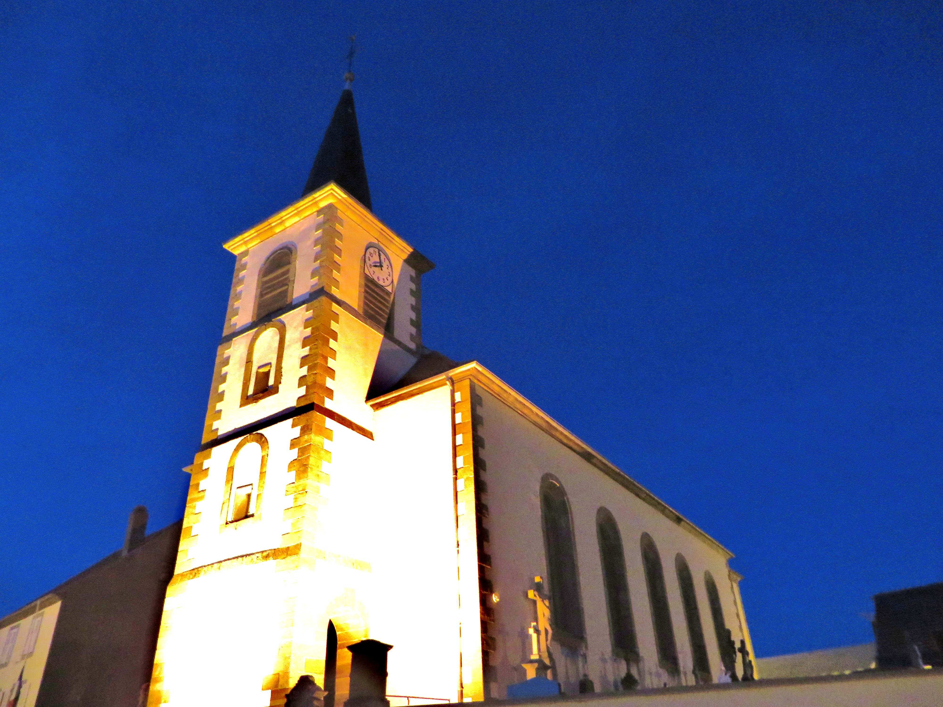 Romelfing eglise